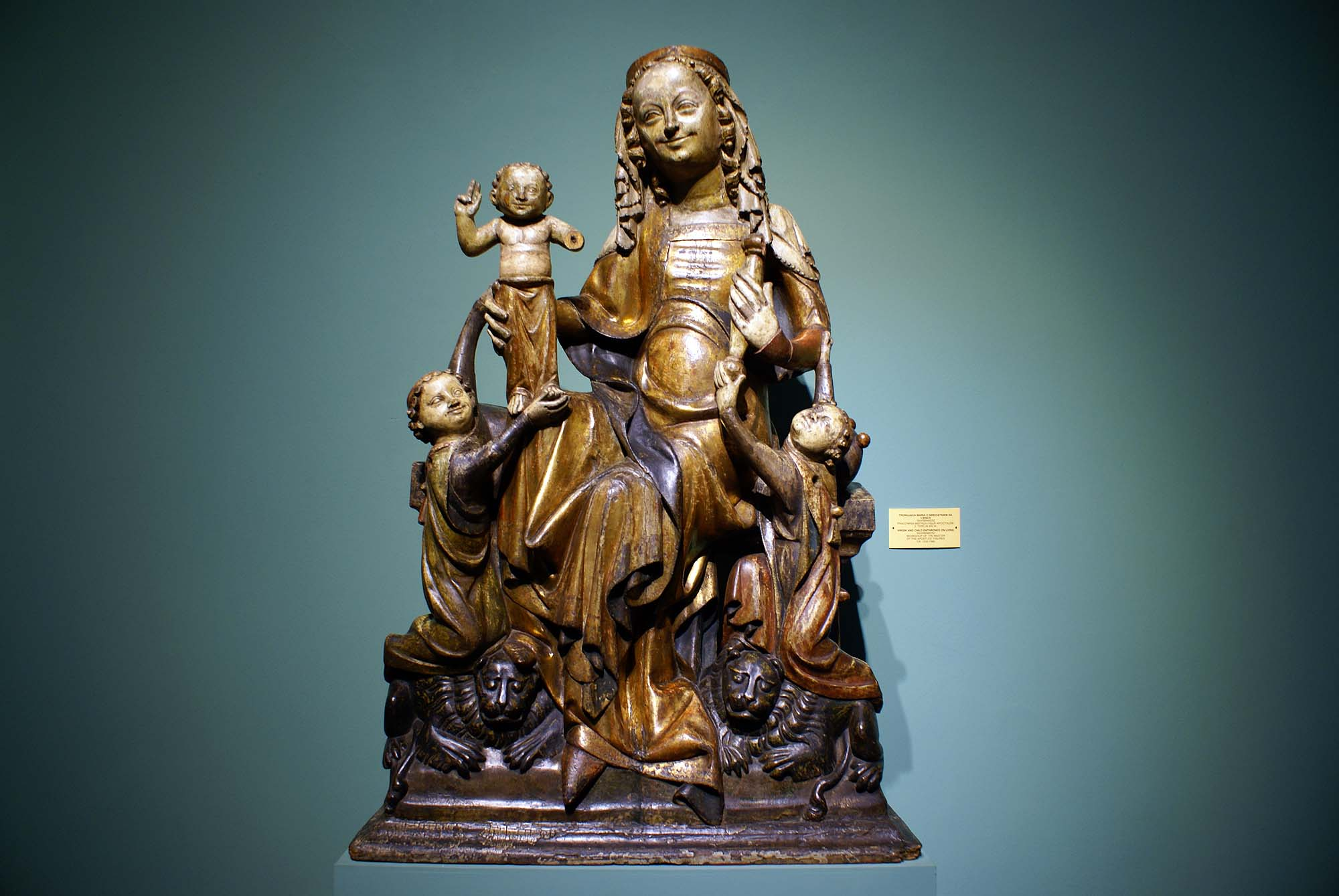 Wrocław, gmach Muzeum Narodowego, 1883-1886